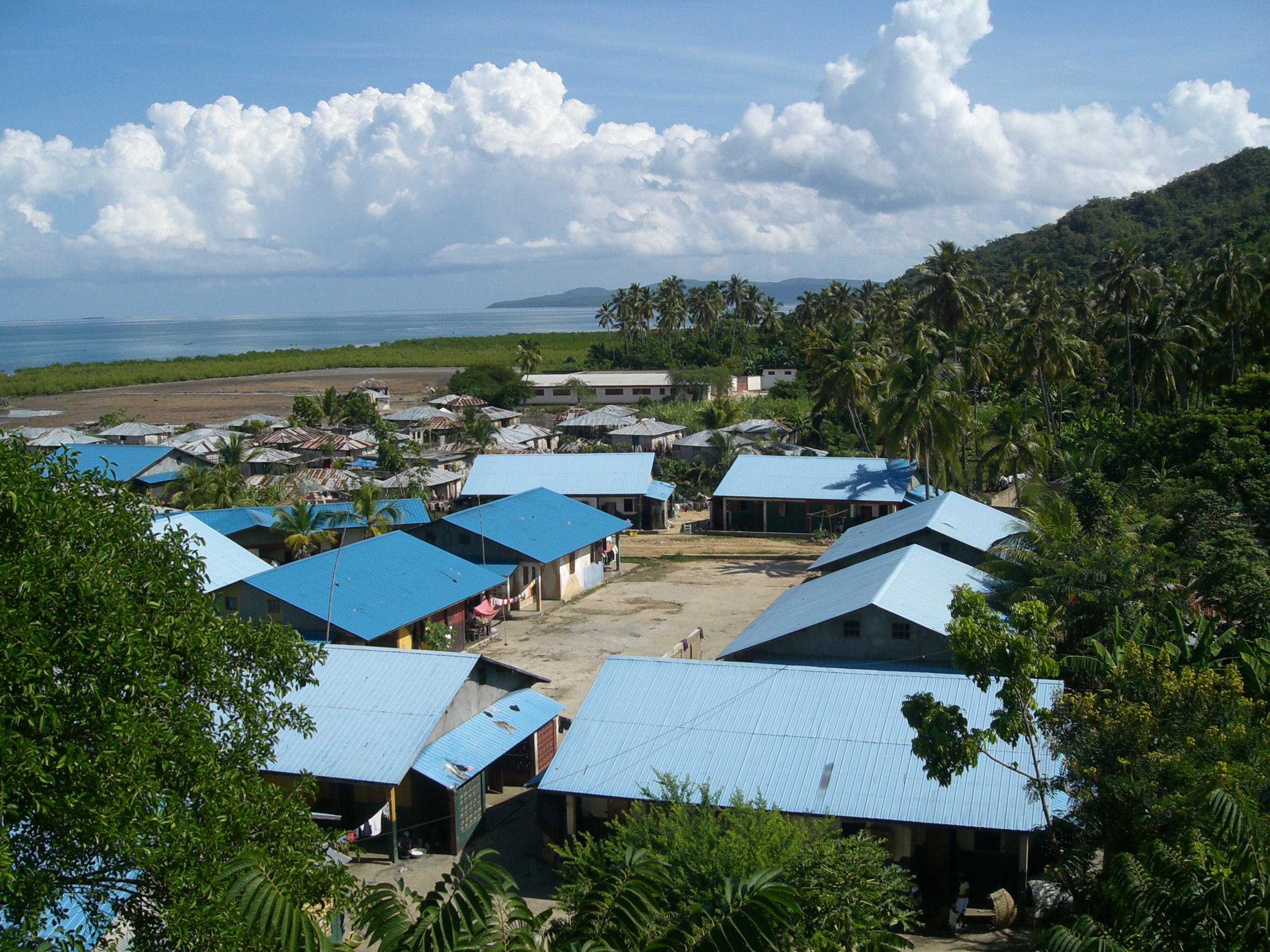 Nouveau quartier, Corail, Haiti